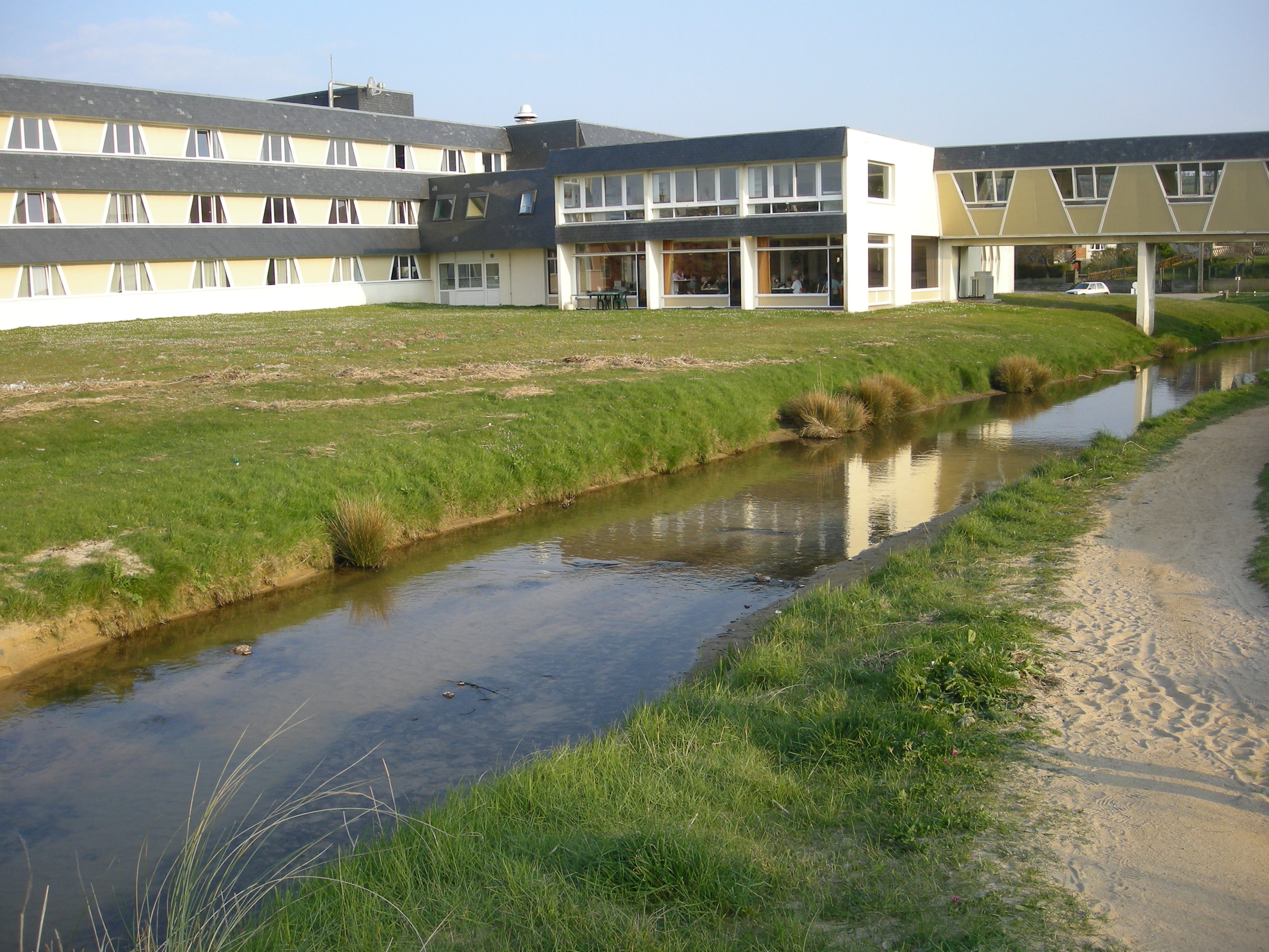 Le Petit Douet et le Centre de Rééducation fonctionnelle de Siouville-Hague (Manche, Normandie, France)